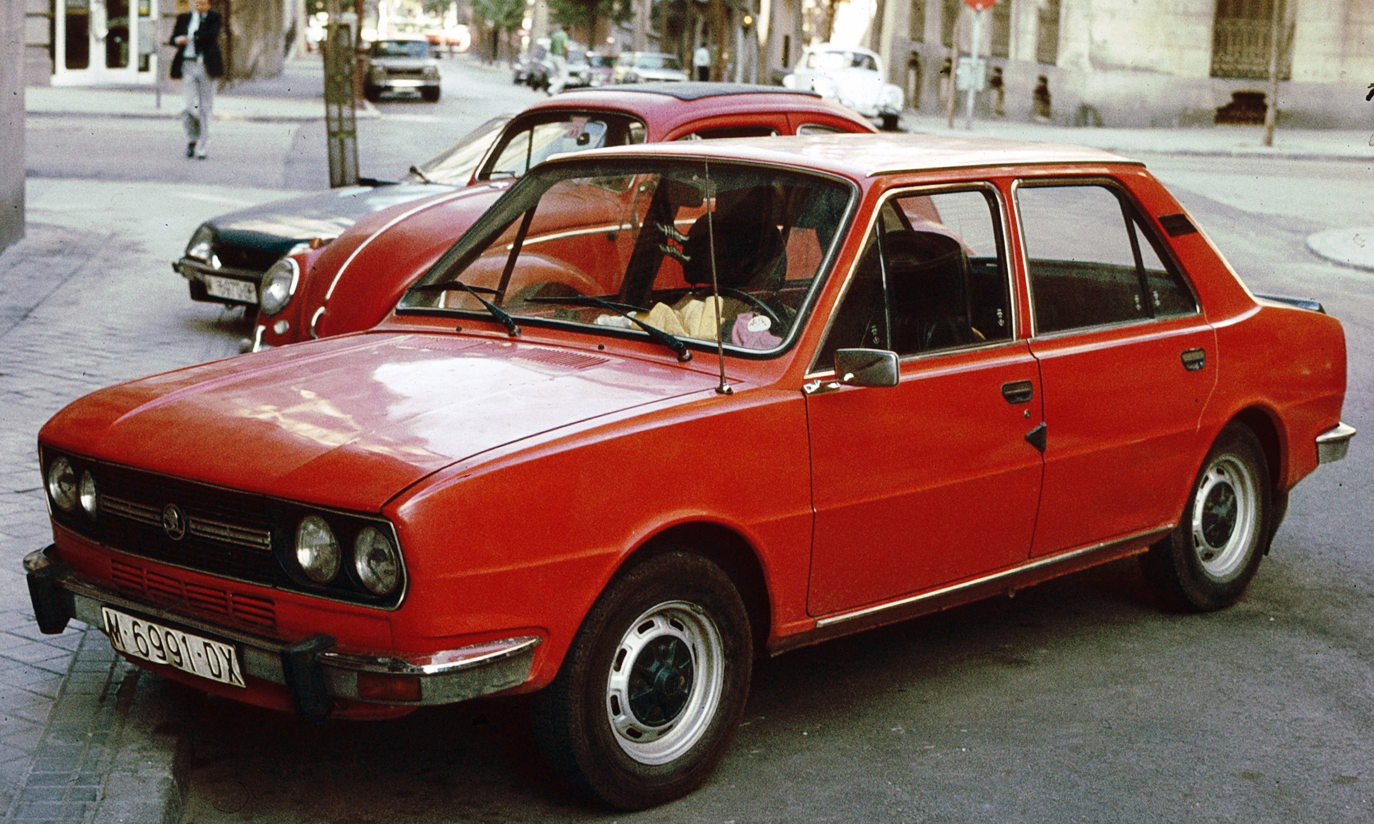 Skoda 120